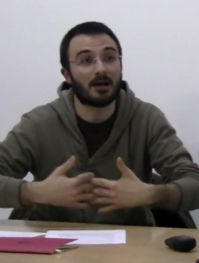 Albert Botran, 2014.